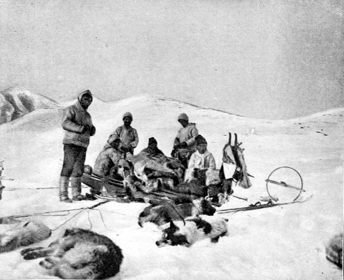 Gruppenfoto der 2. Thule-Expedition